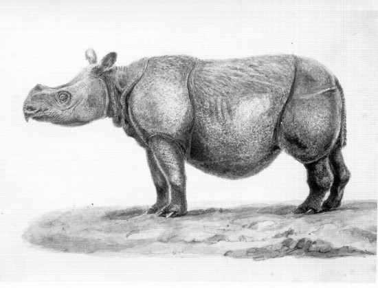 Javan rhinoceros. In the contribution by S. Muller and H. Schlegel in C.J. Temminck, Verhandelingen over de natuurlijke geschiedenis der Nederlandsche overzeesche bezittingen, 1839, pl.3